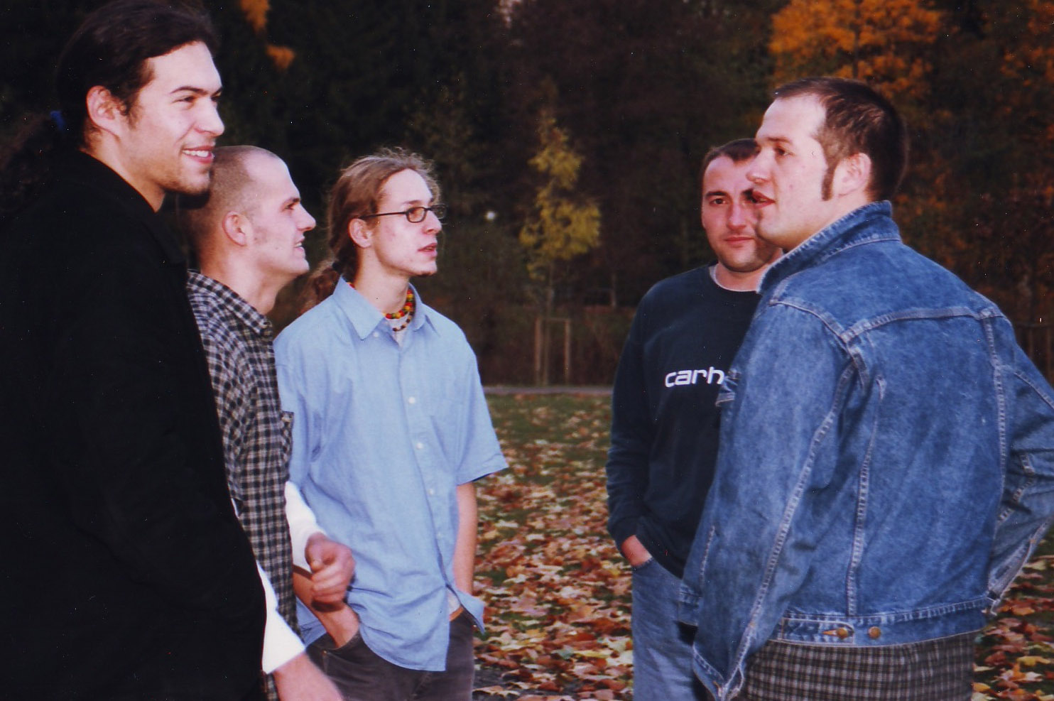 Bandphoto vom 1999er Shooting